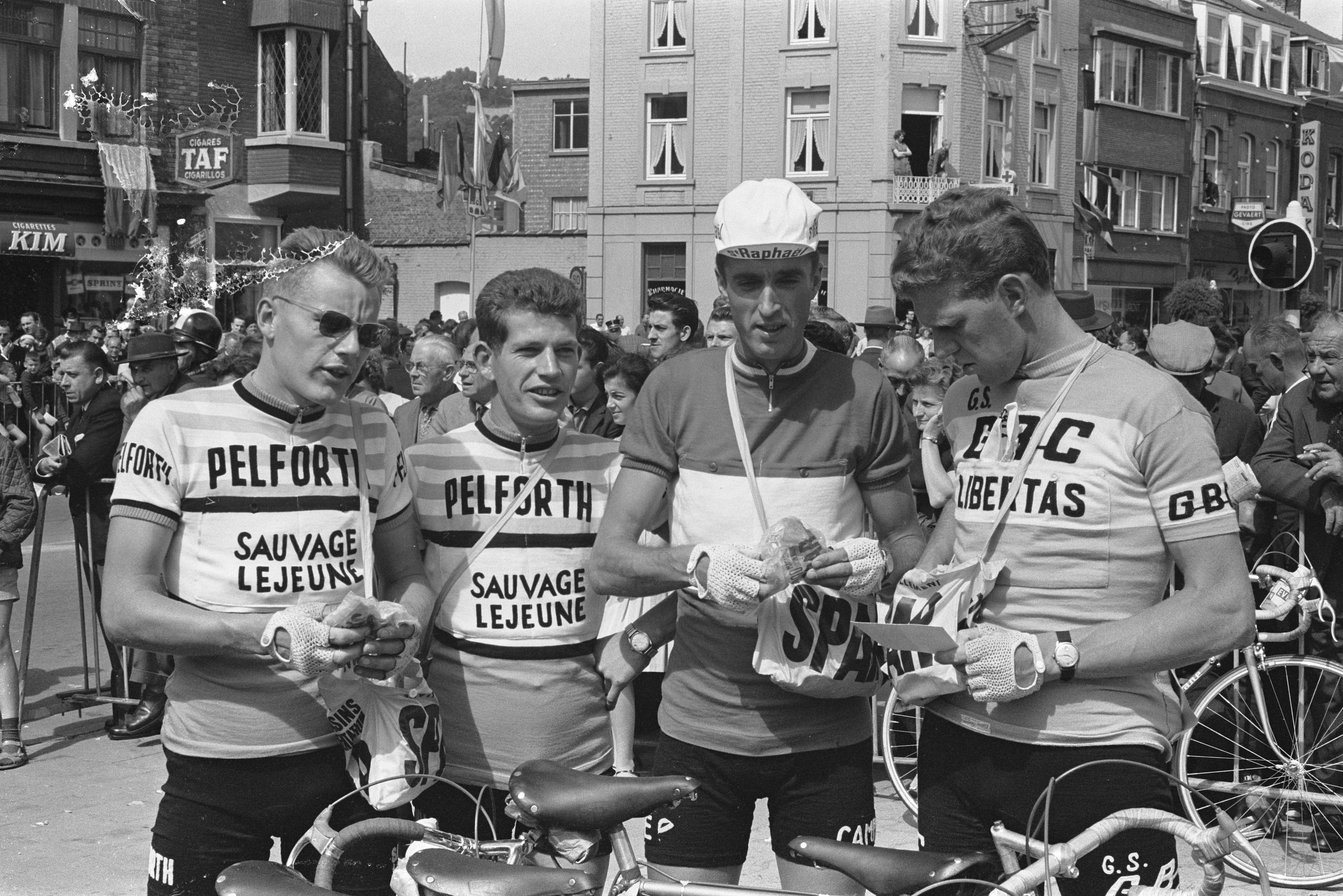 Jan Janssen, Dick Enthoven, Ab Geldermans et Huub Zilverberg lors du départ de la 5e étape du Tour de France 1963 à Rouen.